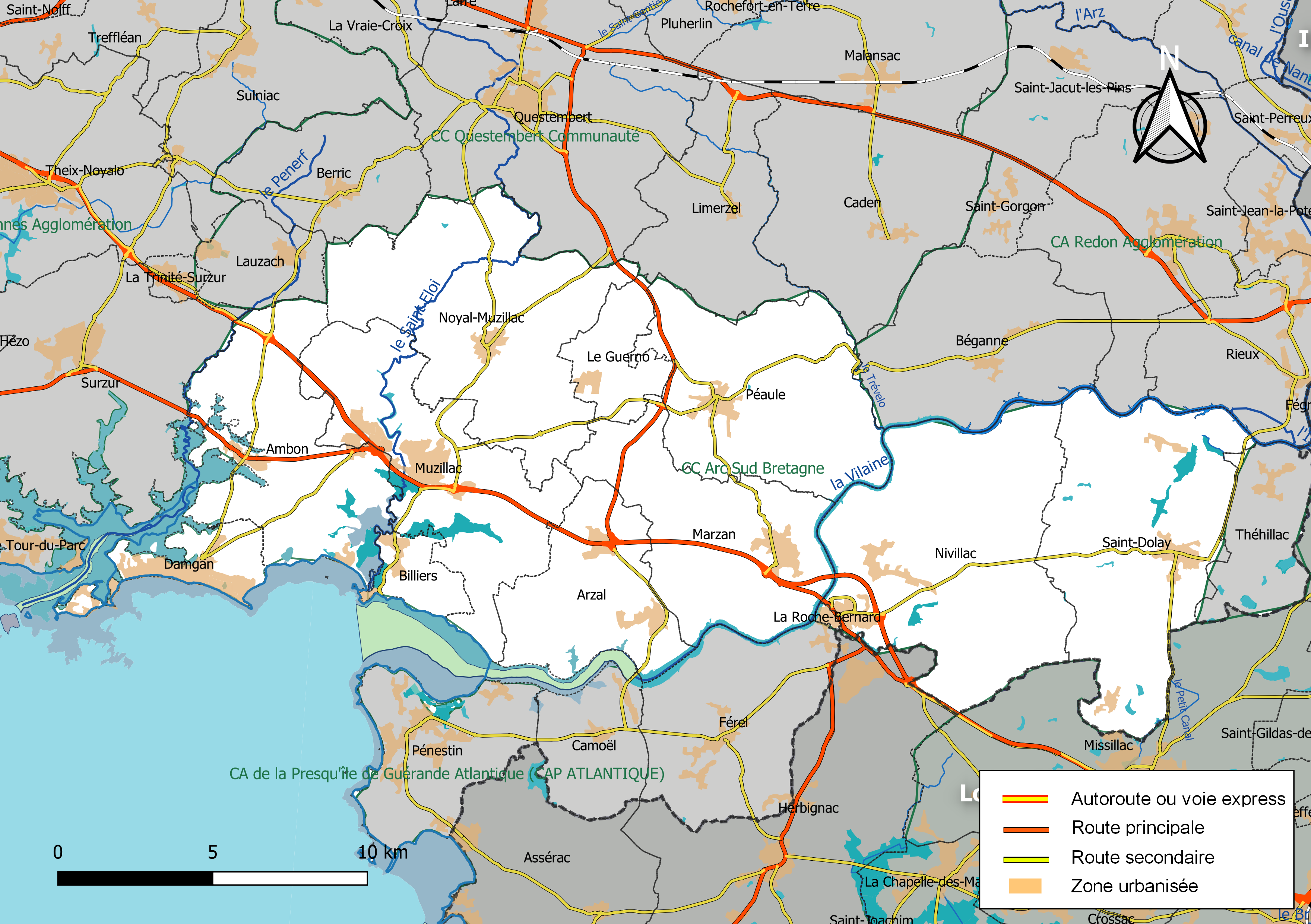 Carte géographique de la Communauté de communes Arc Sud Bretagne, département du Morbihan, France. Composition au 1er janvier 2019.